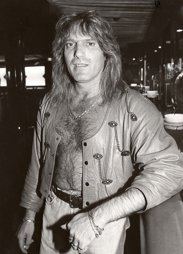 Maurizio Zanfanti, pay-boy italien dans les années 1970